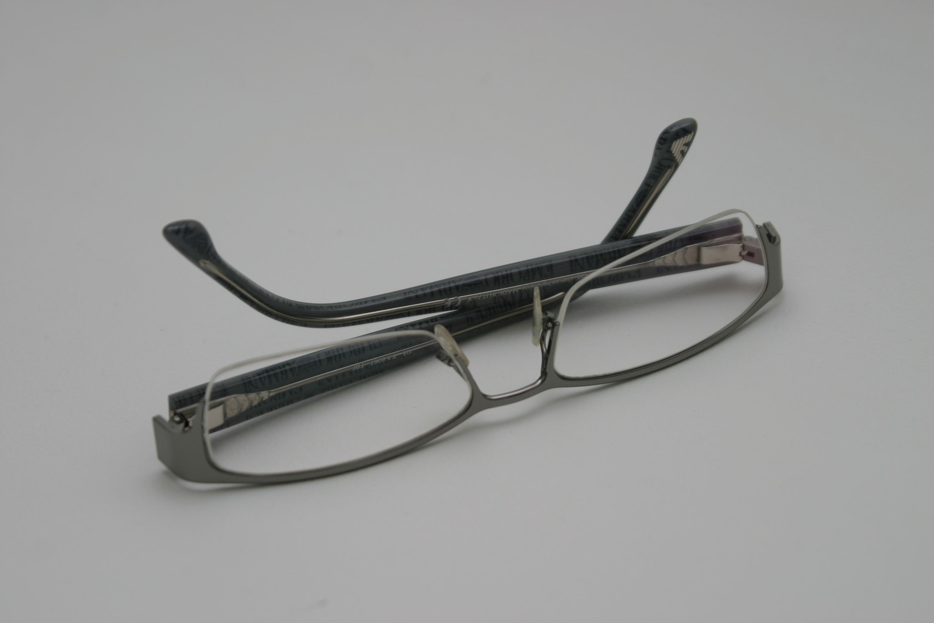 Emporio Armani Glasses